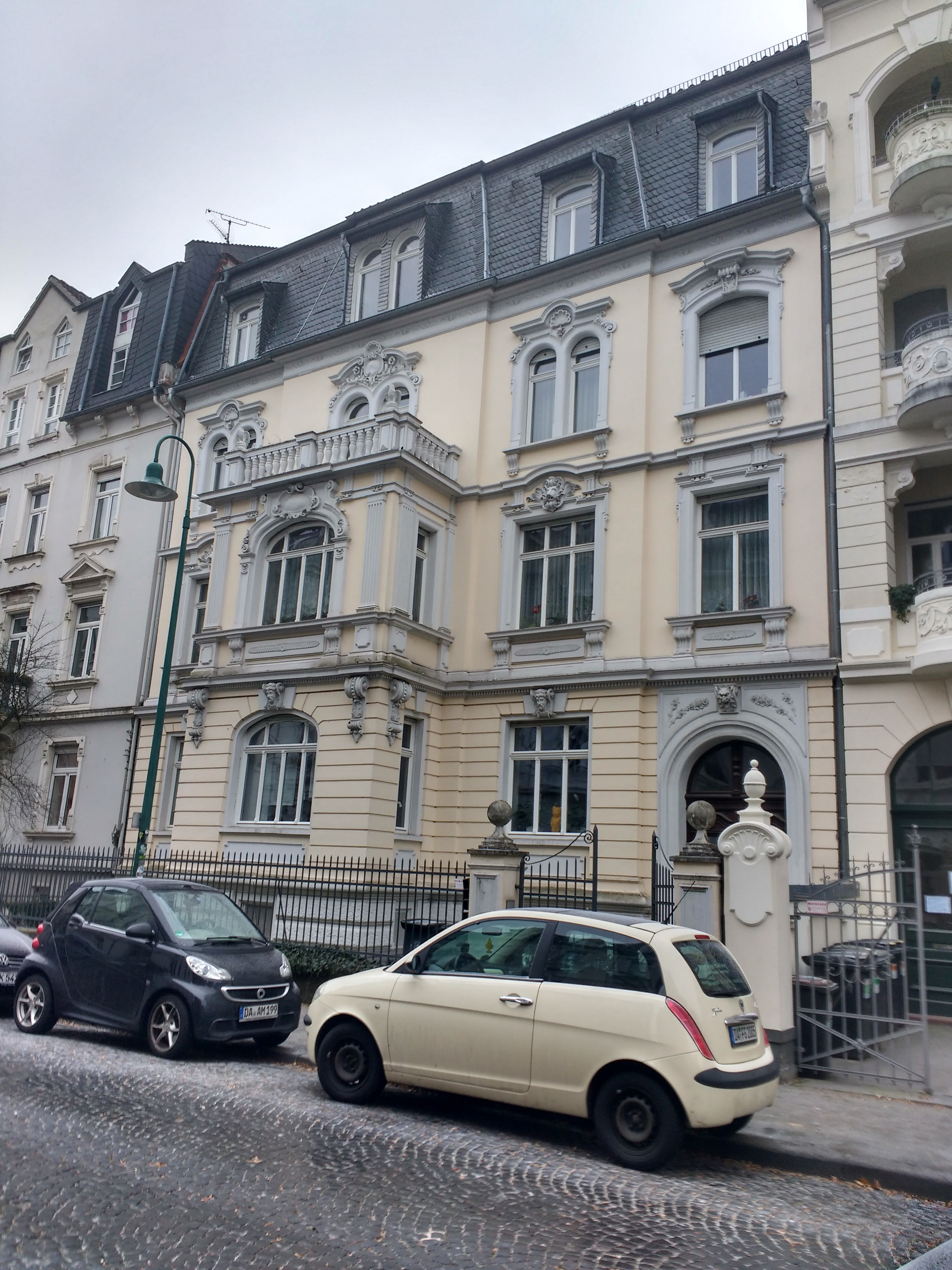 Früheres Wohnhaus der Familie des ehemaligen Darmstädter Rabbiners, Dr. David Selver. Das Haus wurde von seiner Tochter, Dr. Elisabeth Paul, 1958 verkauft